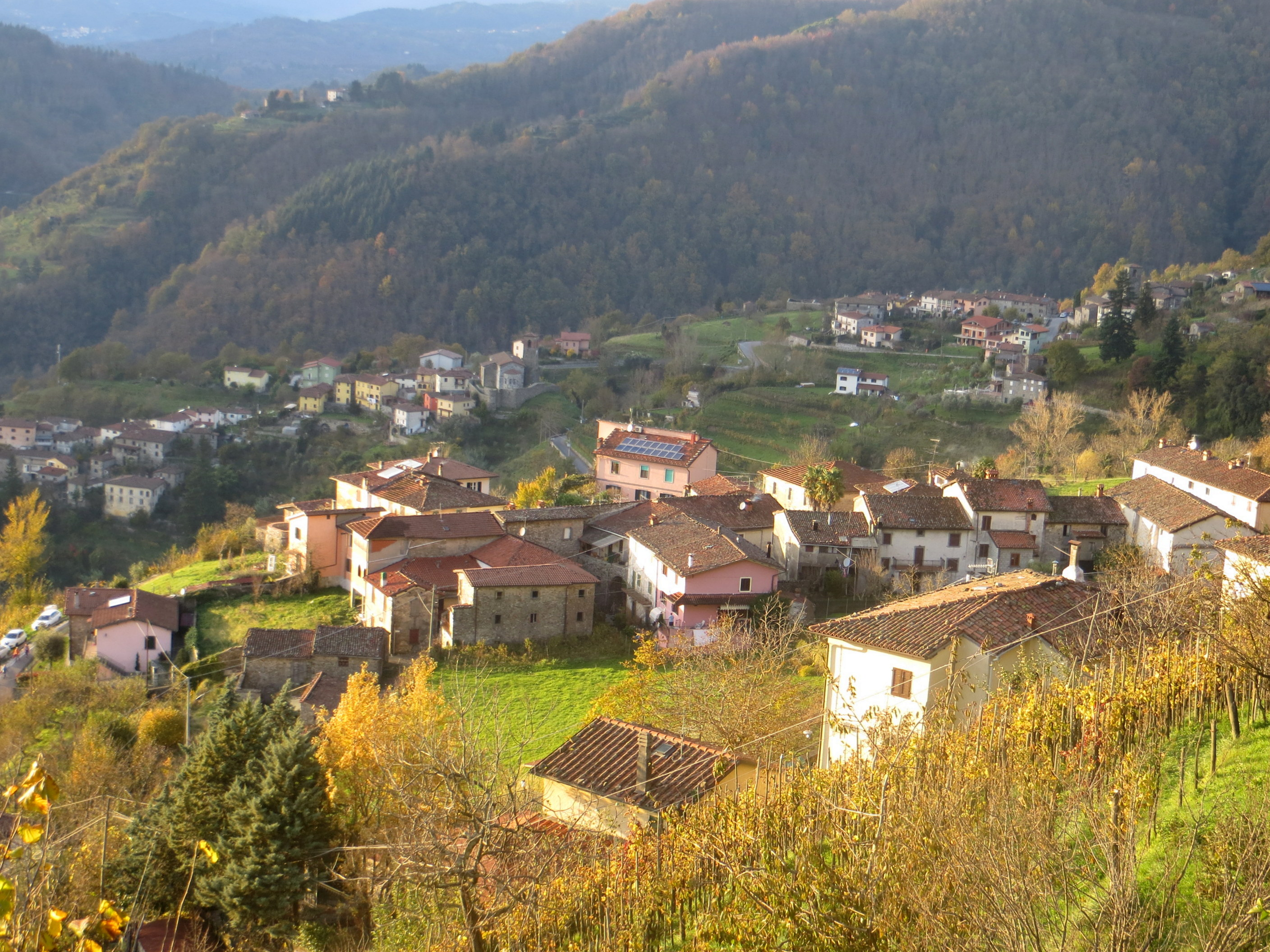 Panorama delle frazioni del comune di Fosciandora: in primo piano Fosciandora, sullo sfondo a sinistra Ceserana e a destra La Villa